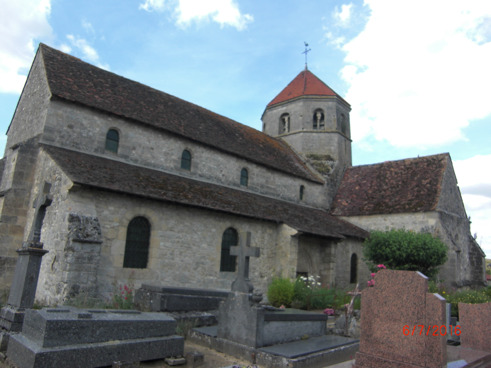 Vu d'ensemble de l'église